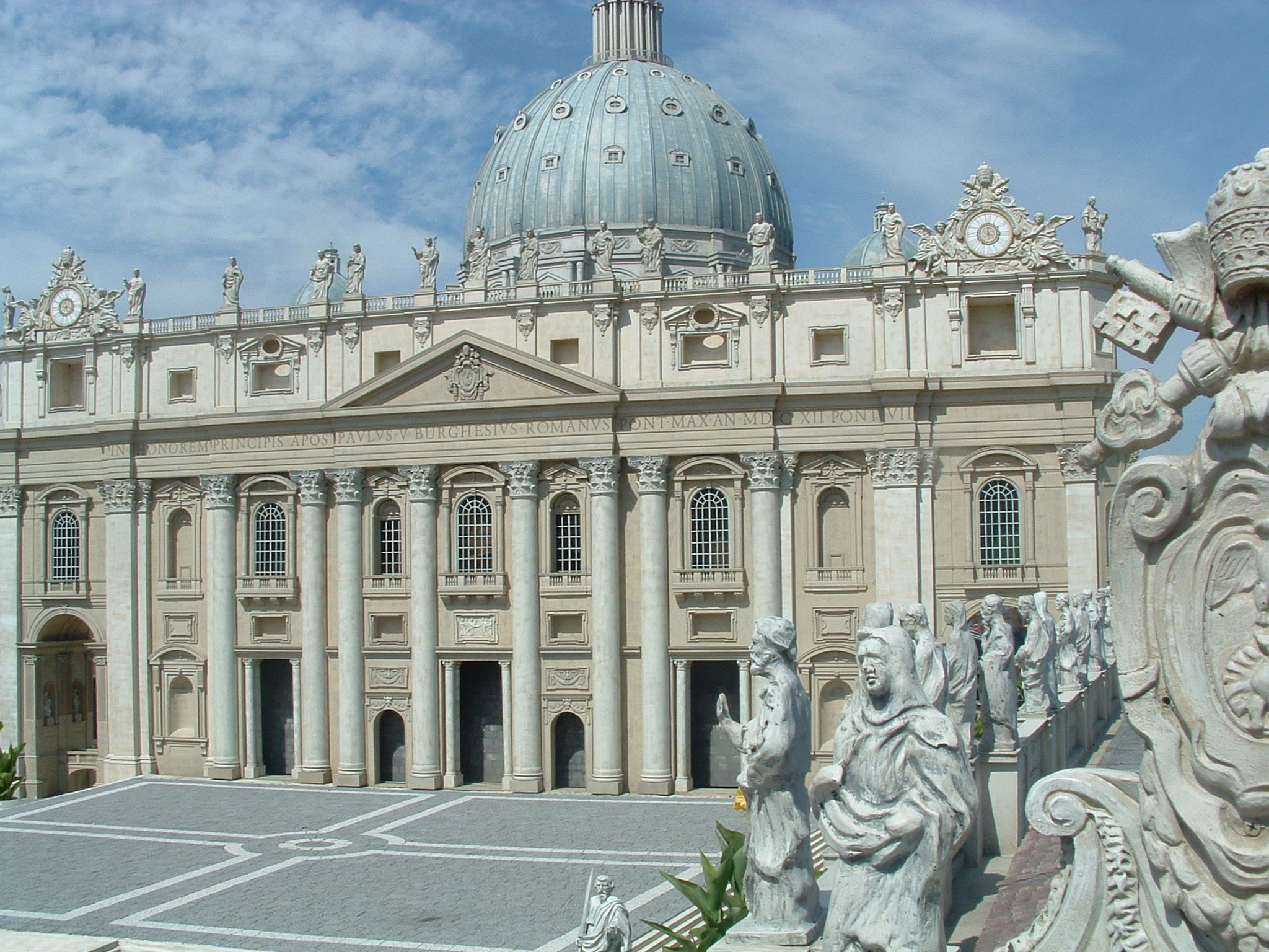 Plac Św. Piotra w Rzymie